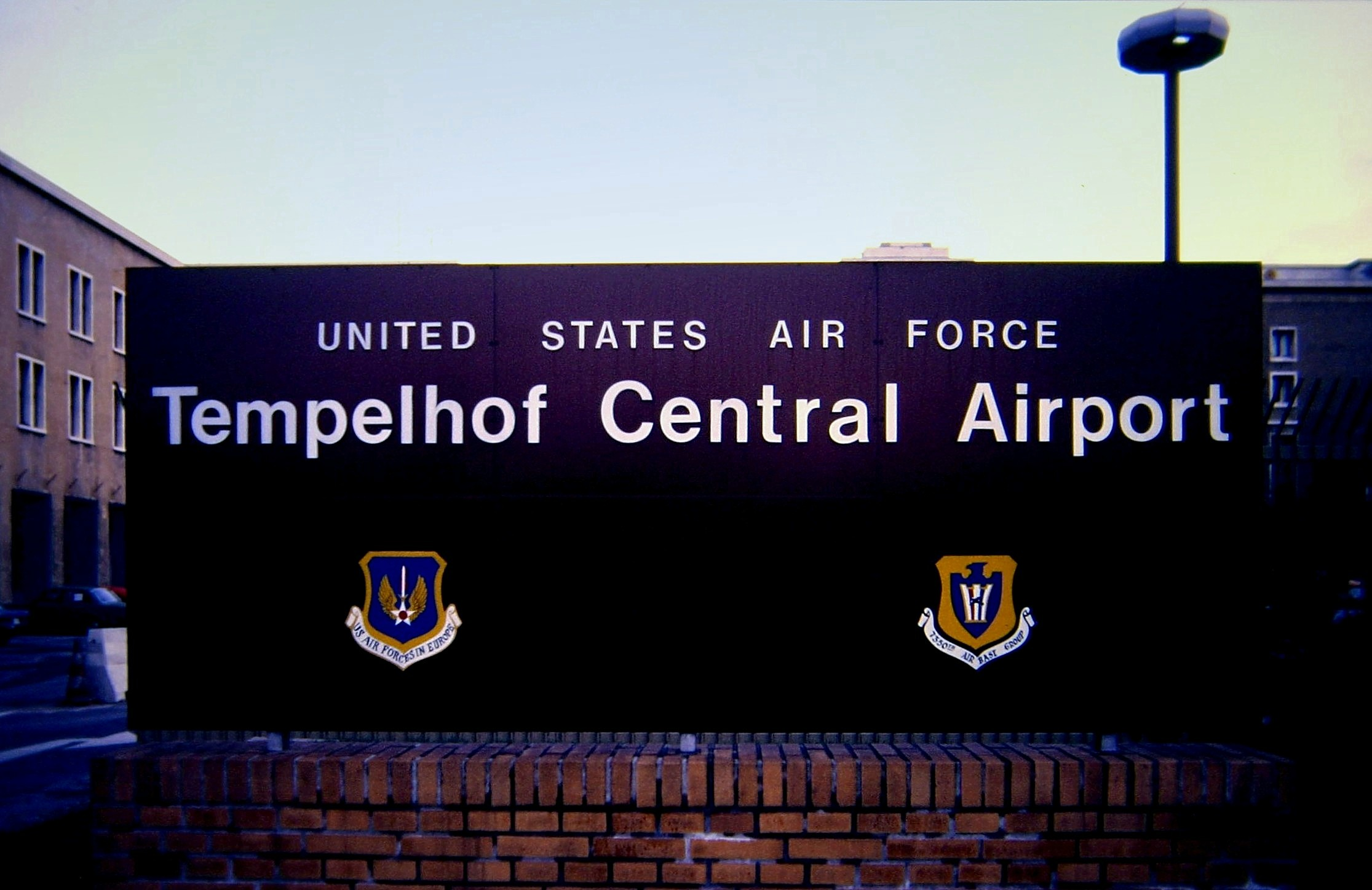 U.S. Air Force, Berlin-Tempelhof, 1988